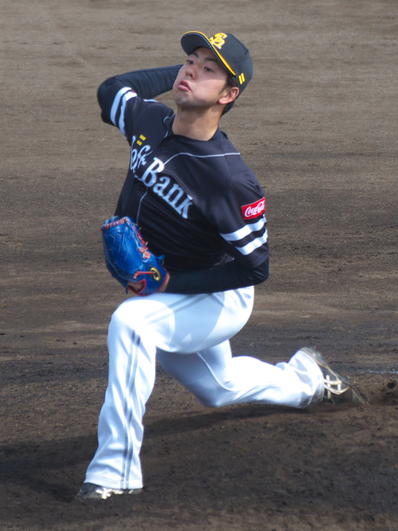 福岡ソフトバンクホークス重田倫明